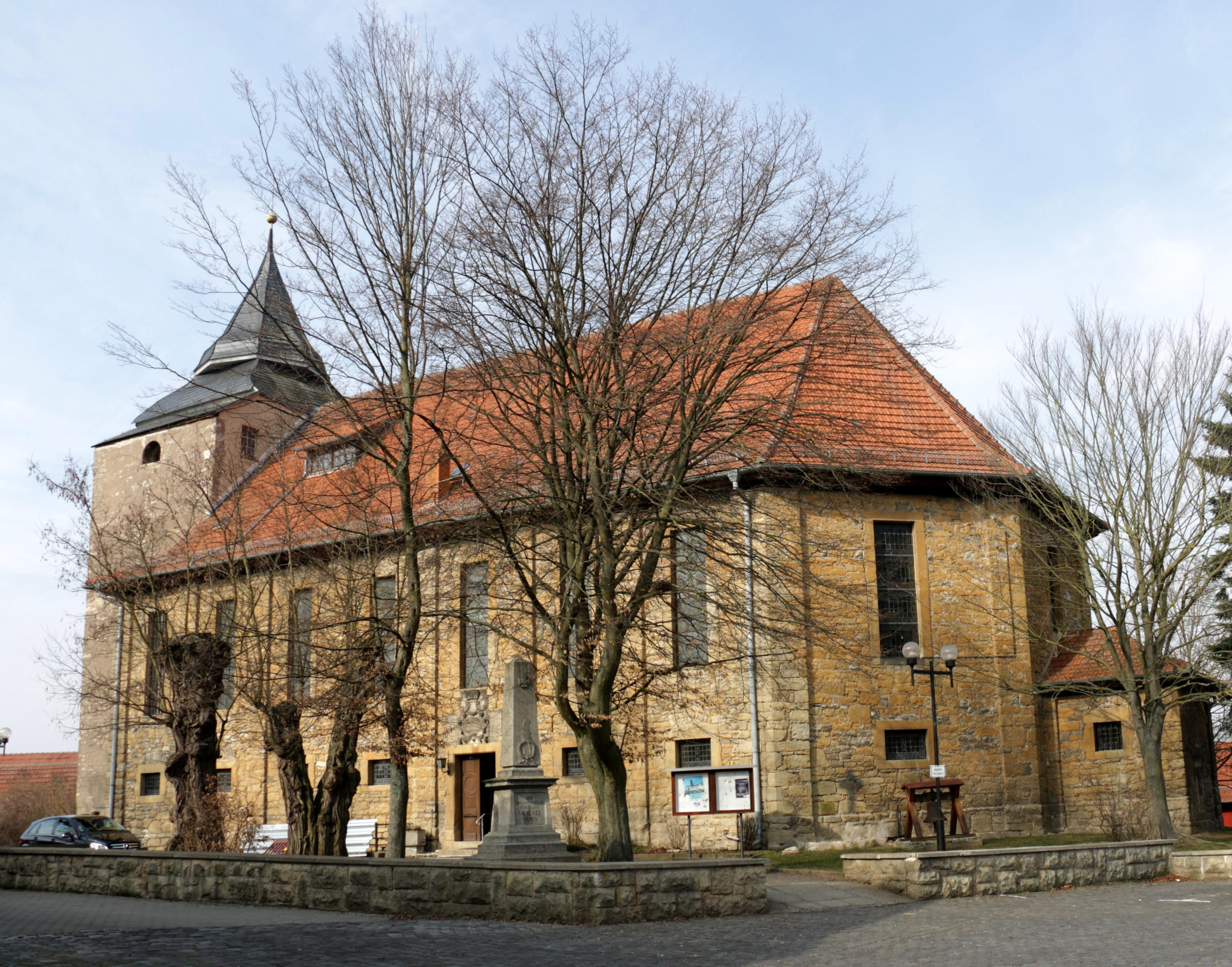 Evangelische Martinskirche in Mihla.